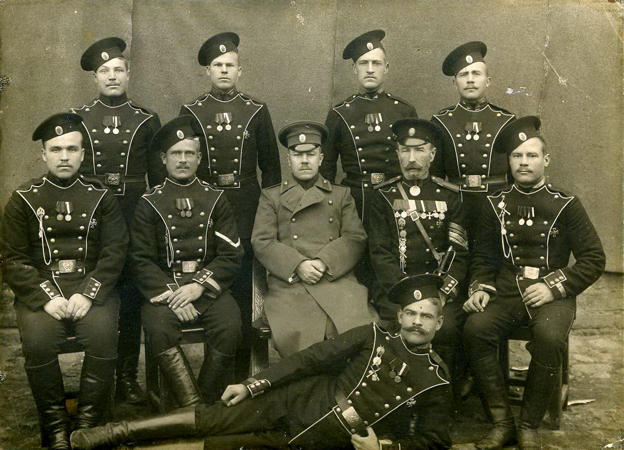 Фото группы военослужащих Лейб-Гвардии Егерского полка. Россия, неизвестная мастерская, после 1913 г. Большинство военнослужащих изображено с медалями "В память 100-летия Отечественной войны 1812 г." и "В память 300-летия Дома Романовых" и знаком полка, также видны полковые жетоны и знаки "За отличную стрельбу", у сидящего 2-ым справа подпрапорщика в должности фельдфебеля с нашивками за сверхсрочную службу кроме перечисленых медалей и множества знаков "За отличную стрельбу", шейная медаль "За усердие", знак отличия ордена Св. Анны, медали "В память царствования Императора Александра III", "В память коронации Императора Николая II" и иностранные награды. Размер 159х116 мм. Состояние ХF. Из коллекции М. Порая.